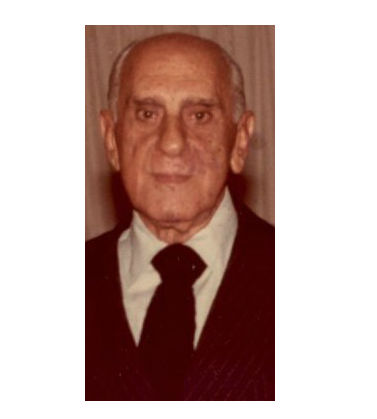 Fernando Ayres da Cunha em meados dos anos 90